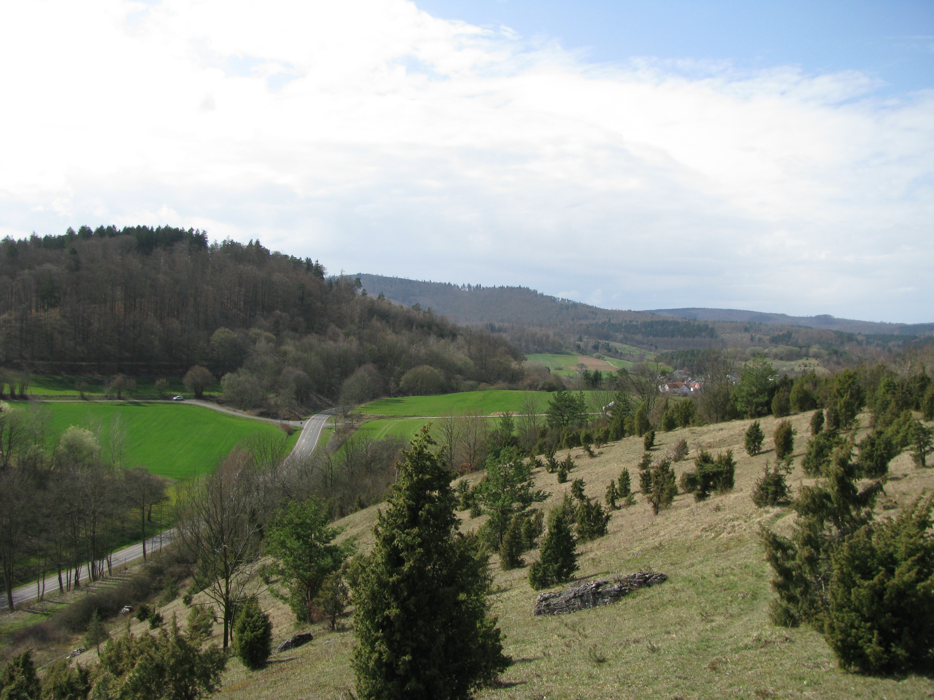 Kalkmagerrasenfläche südöstlich von Witzenhausen-Roßbach, NSG 1636030